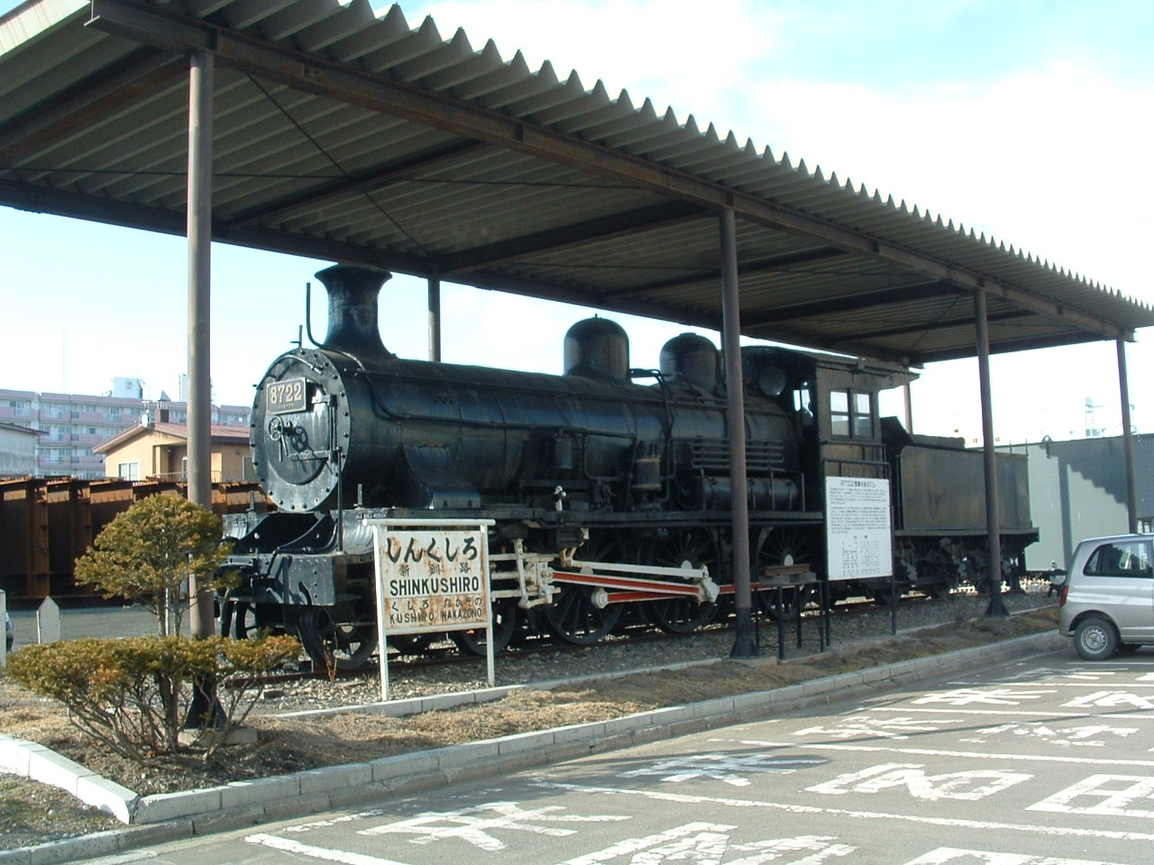 8722号/釧路製作所釧路工場